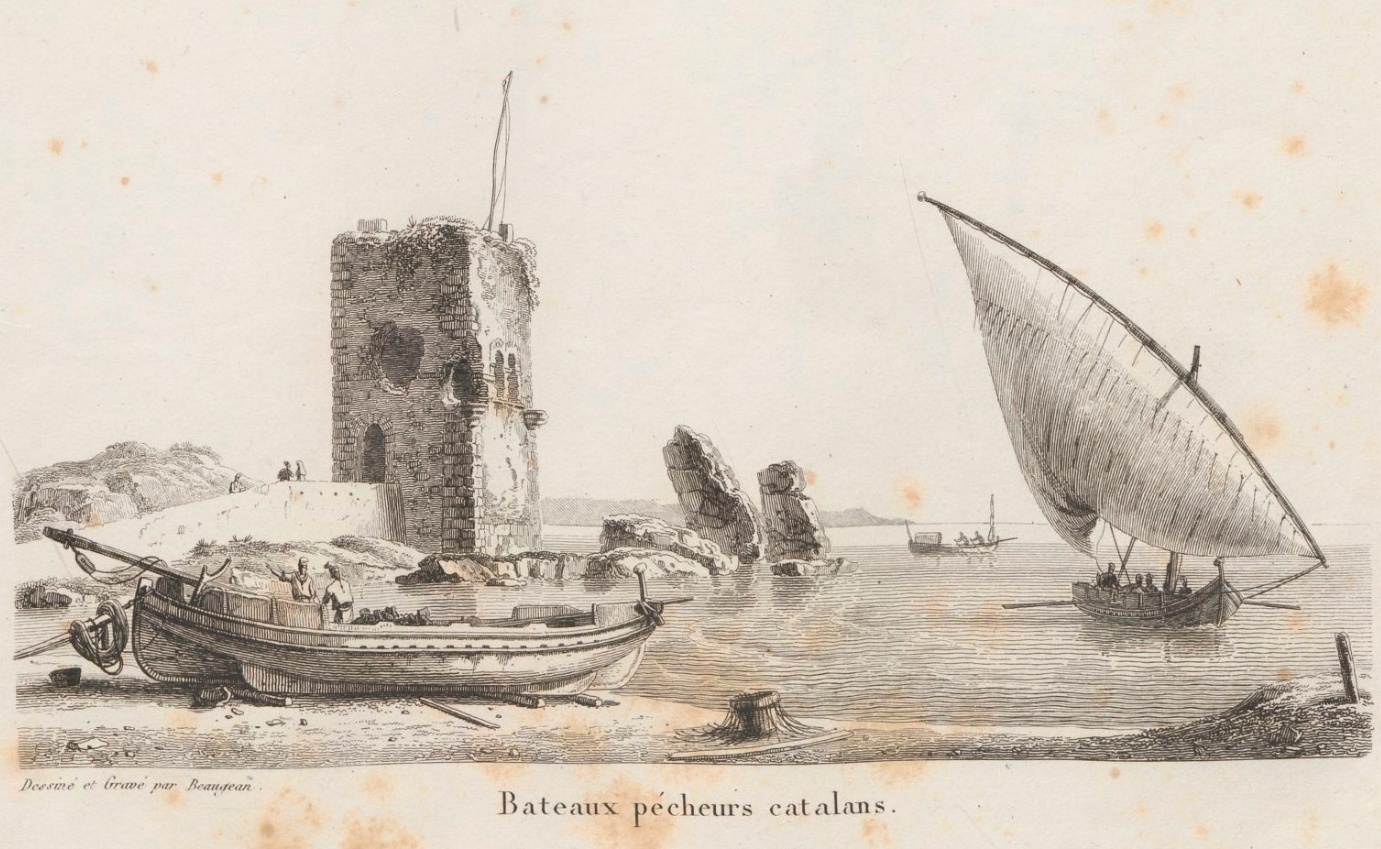 Gravure publiée en 1826 dans la Collection de toutes les espèces de bâtiments de guerre et de bâtiments marchands qui naviguent sur l'Océan et dans la Méditerranée, dessinée d'après nature et gravée par Baugean, mais réalisée avant 1819 (date de la mort de l'auteur).